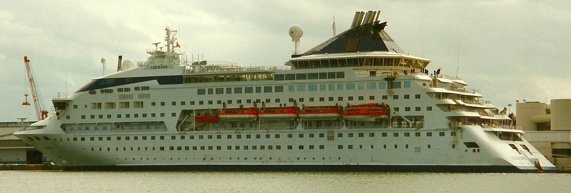 Hafen Miami Florida